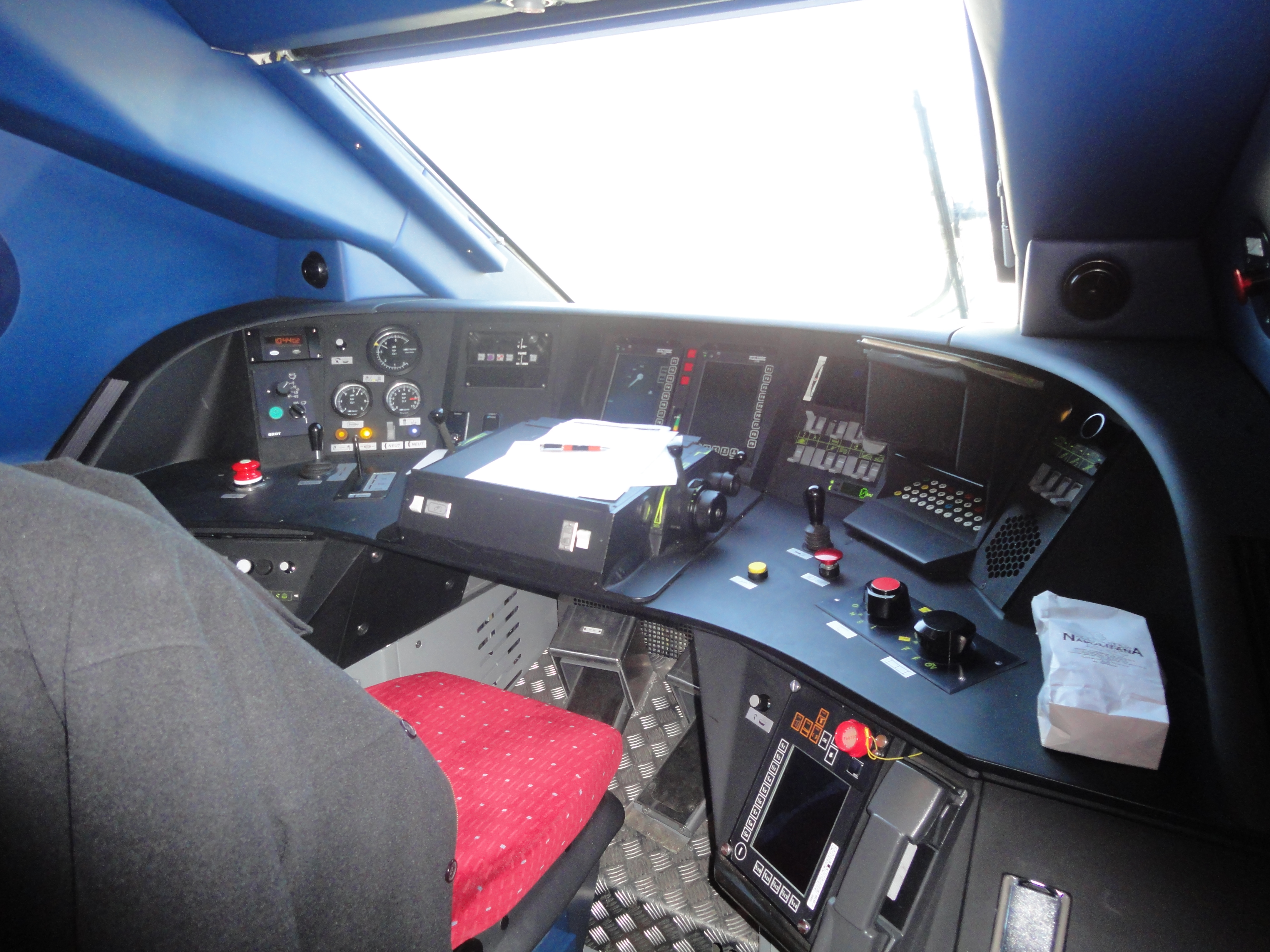 Cabina de un TGV Dúplex en Figueres-Vilafant.